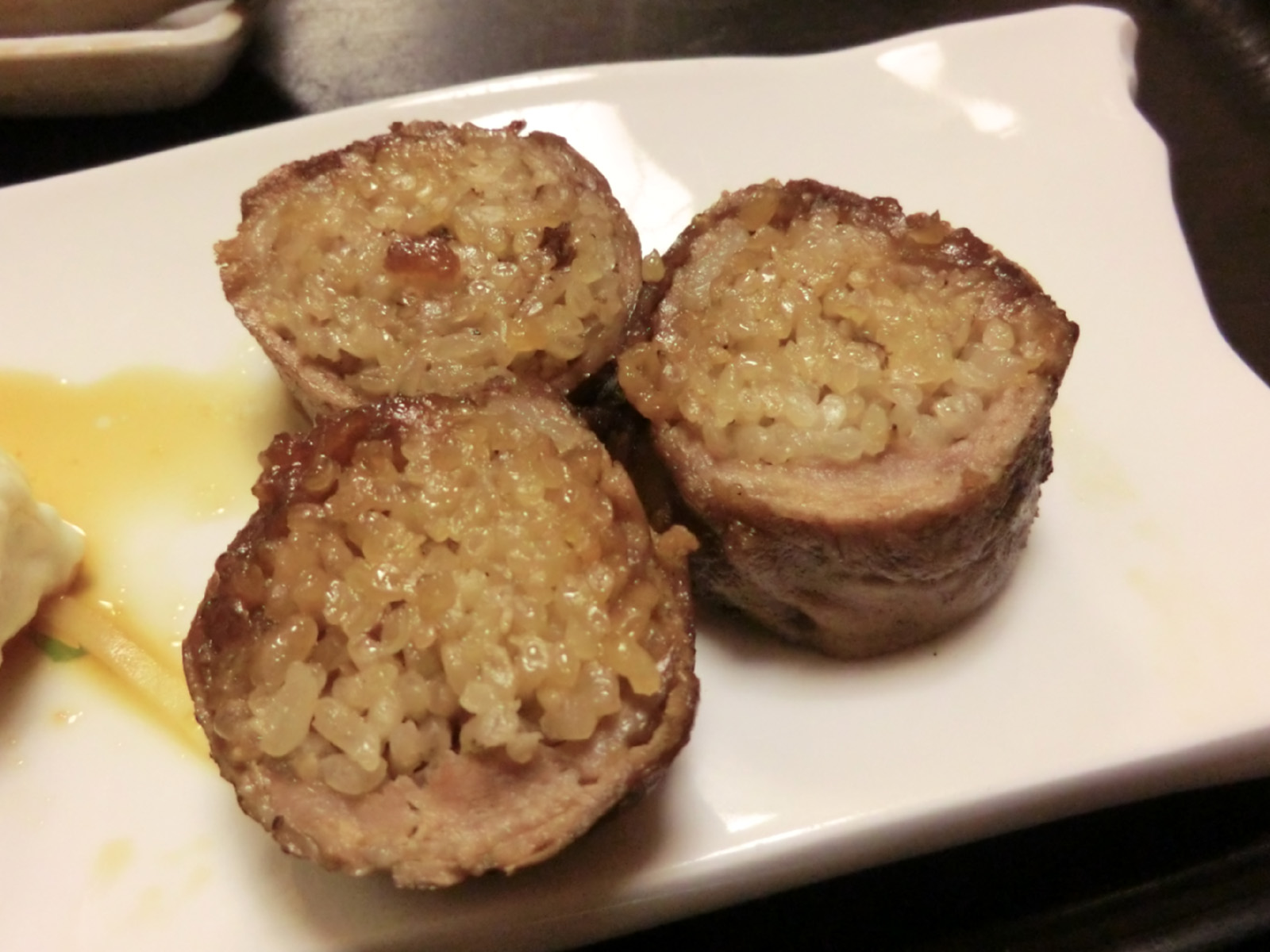 三重県桑名市のご当地グルメ「桑名流！しぐれ肉巻きおにぎり」（カットされたもの）。アサリの時雨煮を混ぜ込んだご飯を用いた肉巻きおにぎり。歌行燈本店（江戸町）にて撮影。